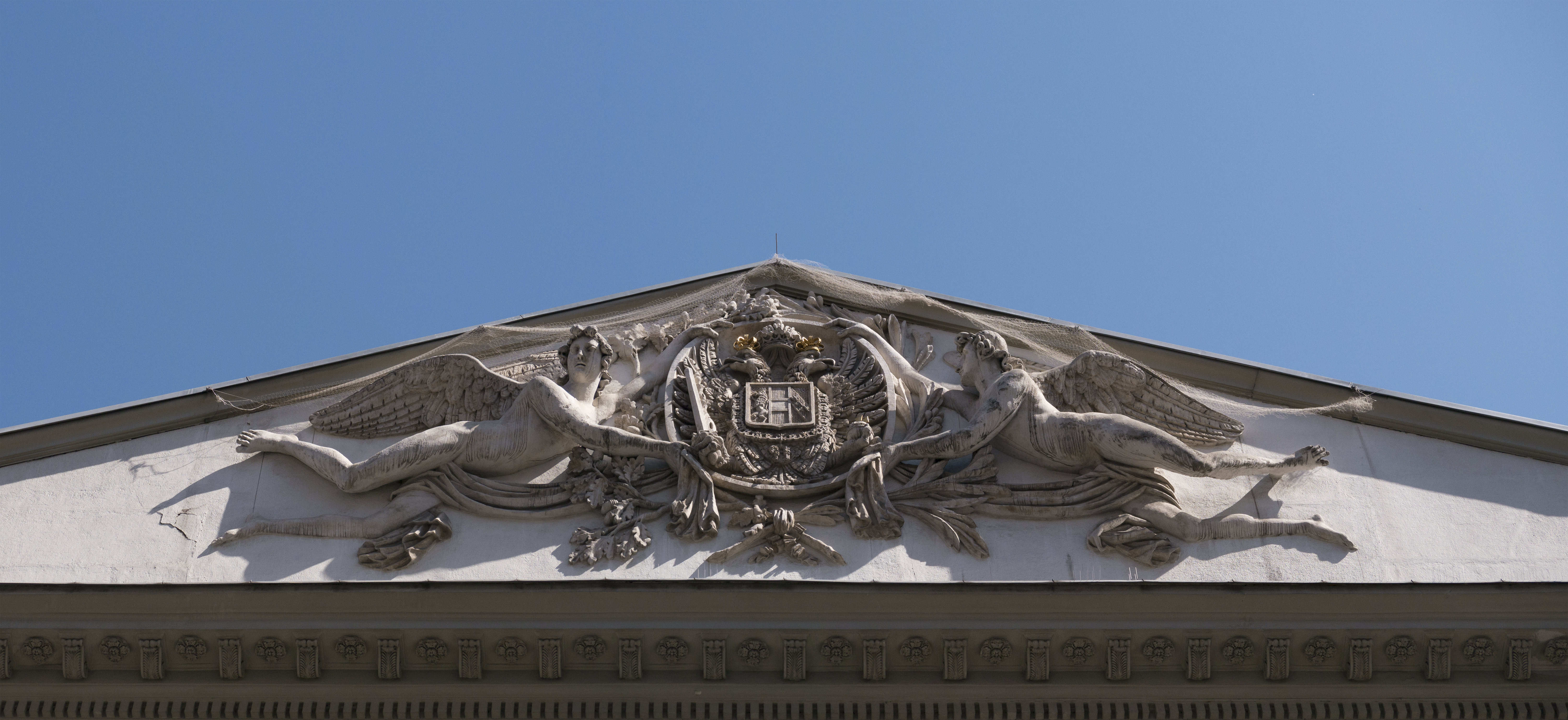 Hauptpost, ehem. Laurenzergebäude